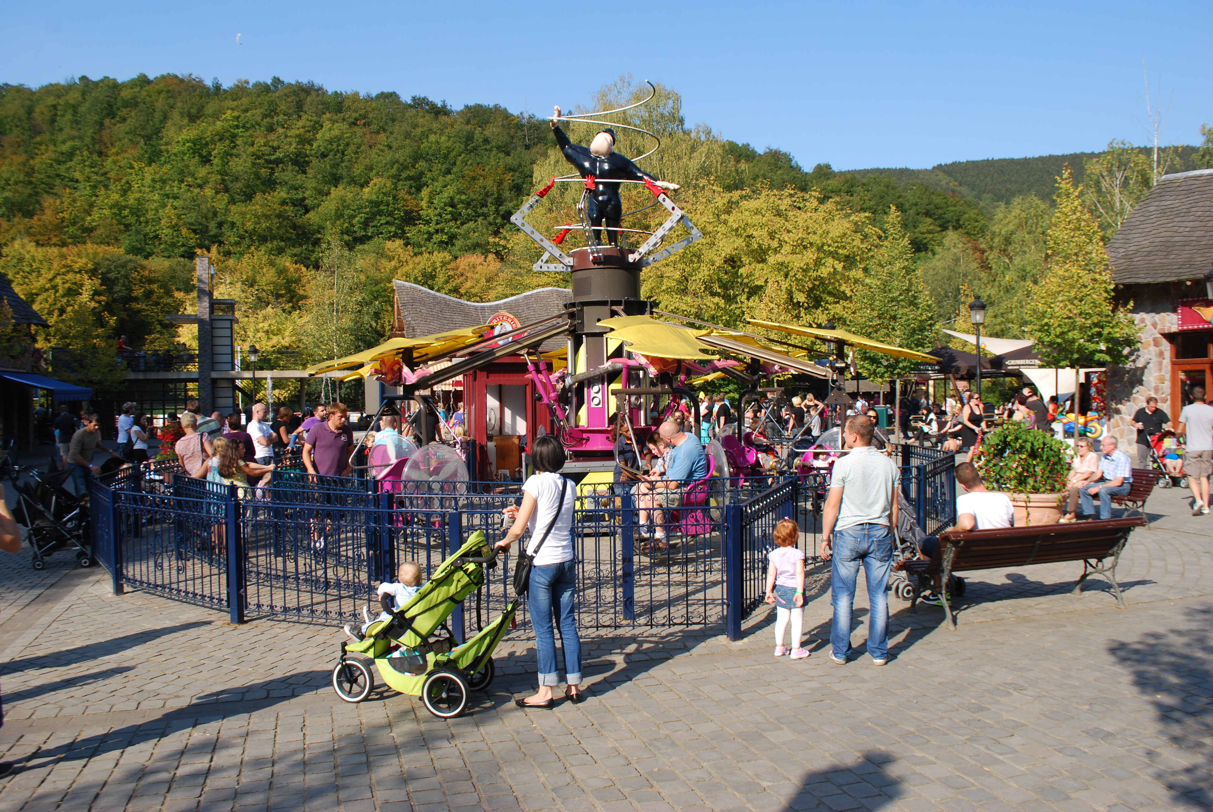 Vue de Plopsa Coo.